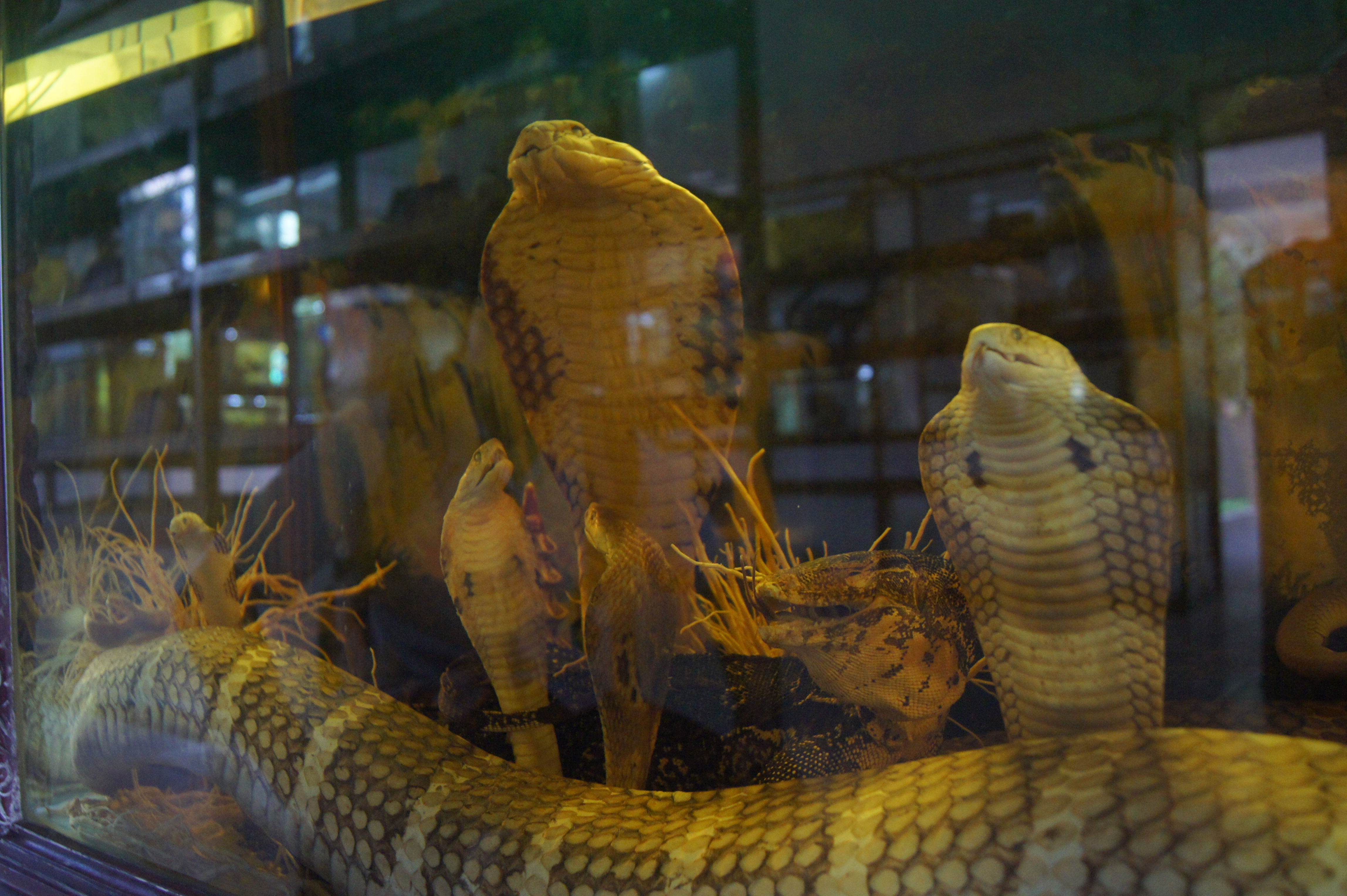 Tiêu bản rắn hổ mang trưng bày ở Bảo tàng rắn Đồng Tâm